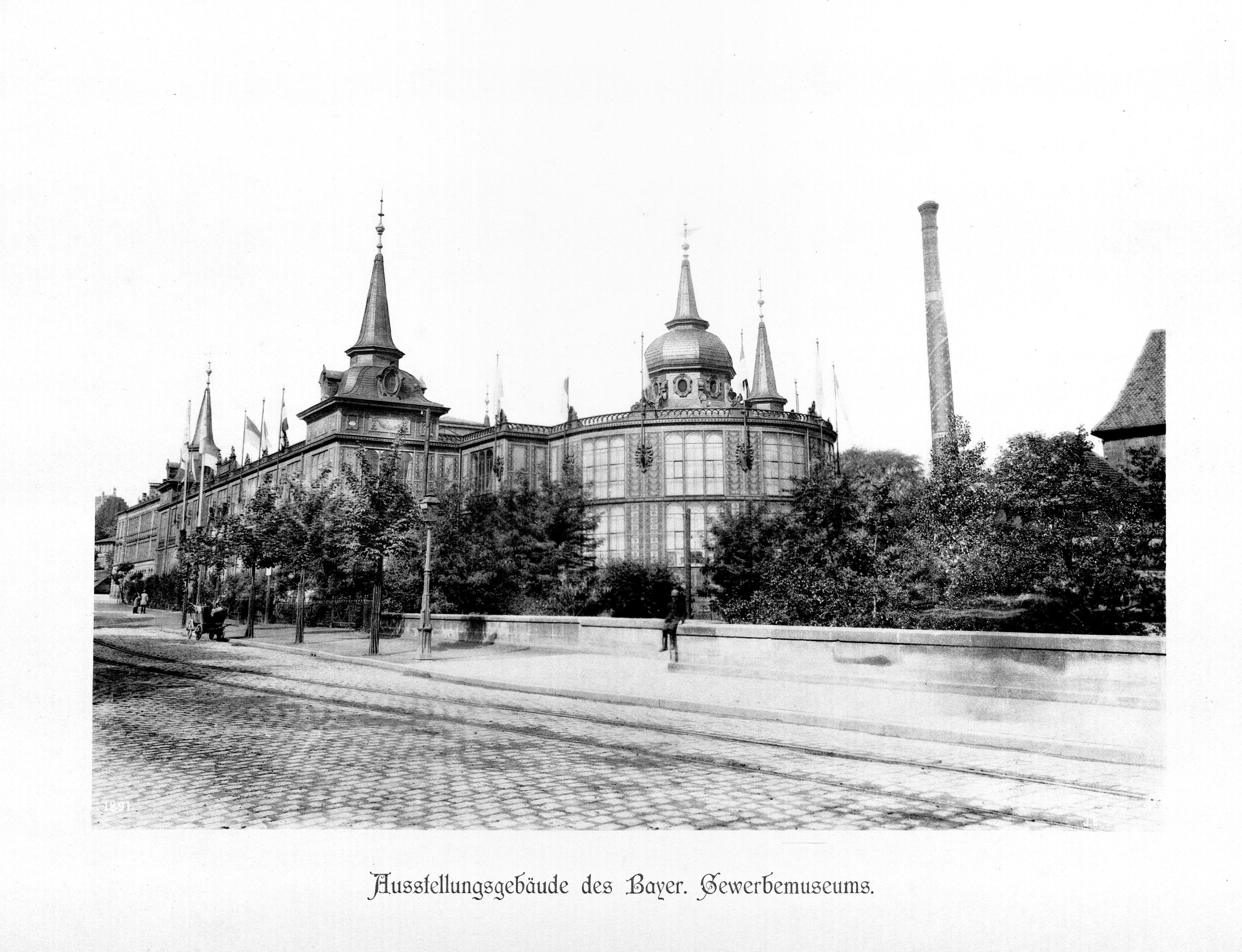 Ausstellungsgebäude des Bayer. Gewerbemuseums vor dem Neubau). Architekt: Adolf Gnauth. Aus dem Band Die Baudenkmäler der Stadt Nürnberg. Erste Nürnberger Lichtdruckanstalt & Kunstverlag Brunner. Nürnberg 1891. 2011 digitalisiert von der Ohm-Hochschulbibliothek Nürnberg. Exemplar mit der Signatur: Nürnberg, Ohm-Hochschulbibliothek -- 901/2.213 / M a